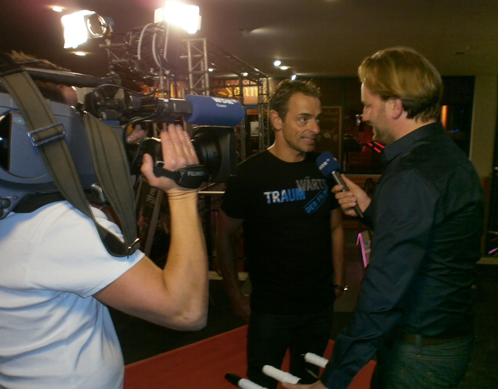 Filmpremie mit Andreas Niedrig